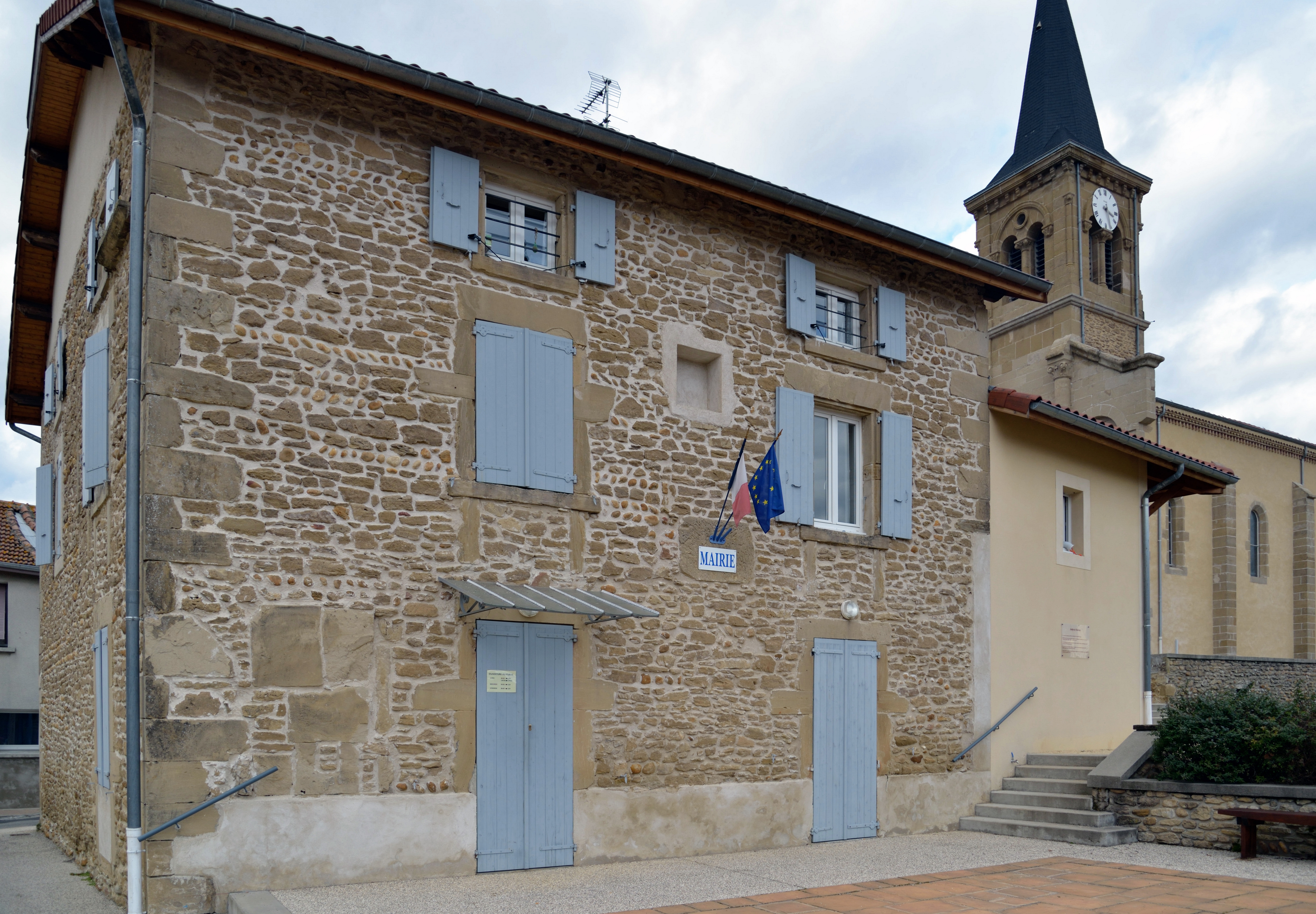 la mairie